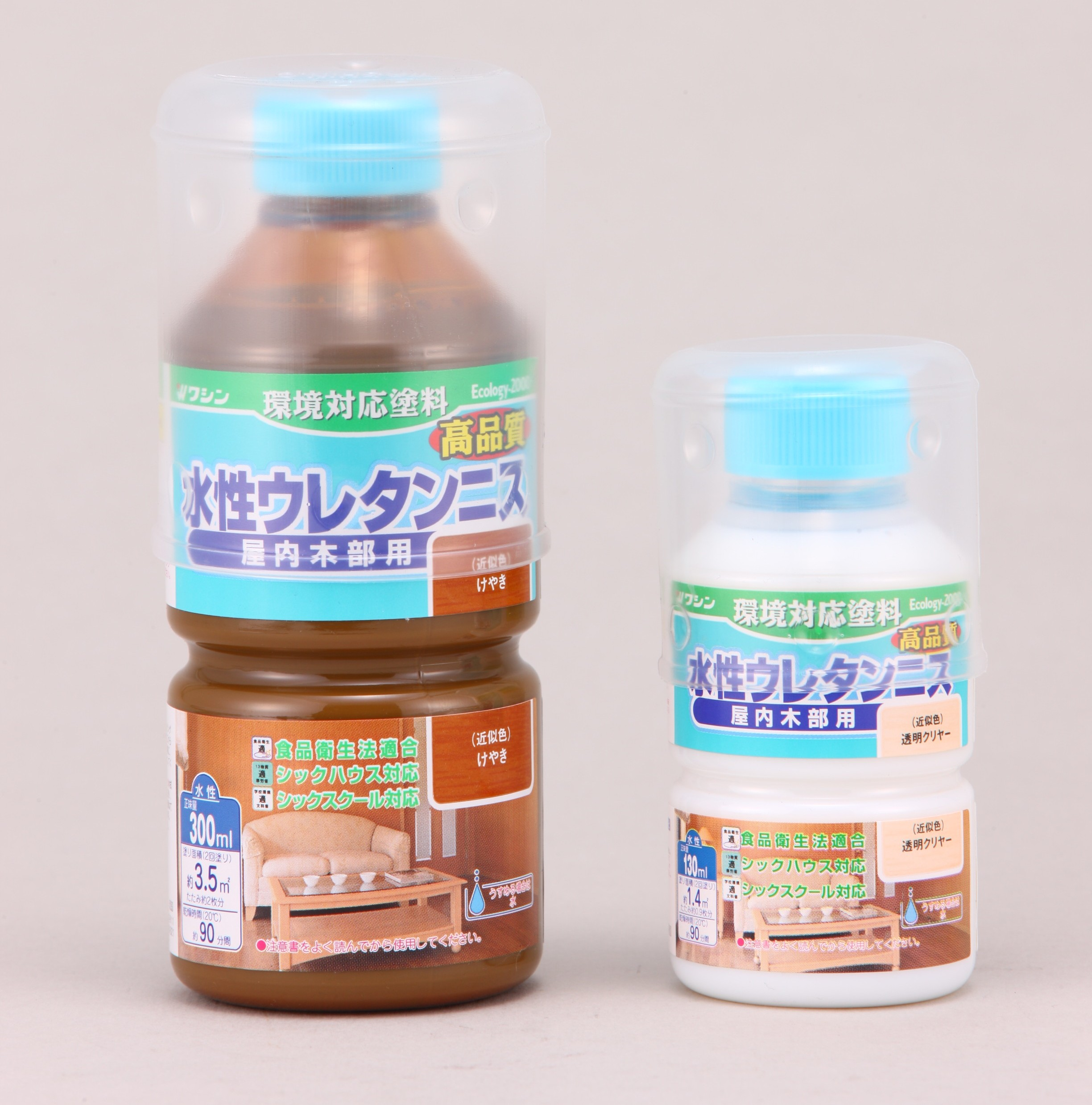 塗料の写真 水性ウレタンニス